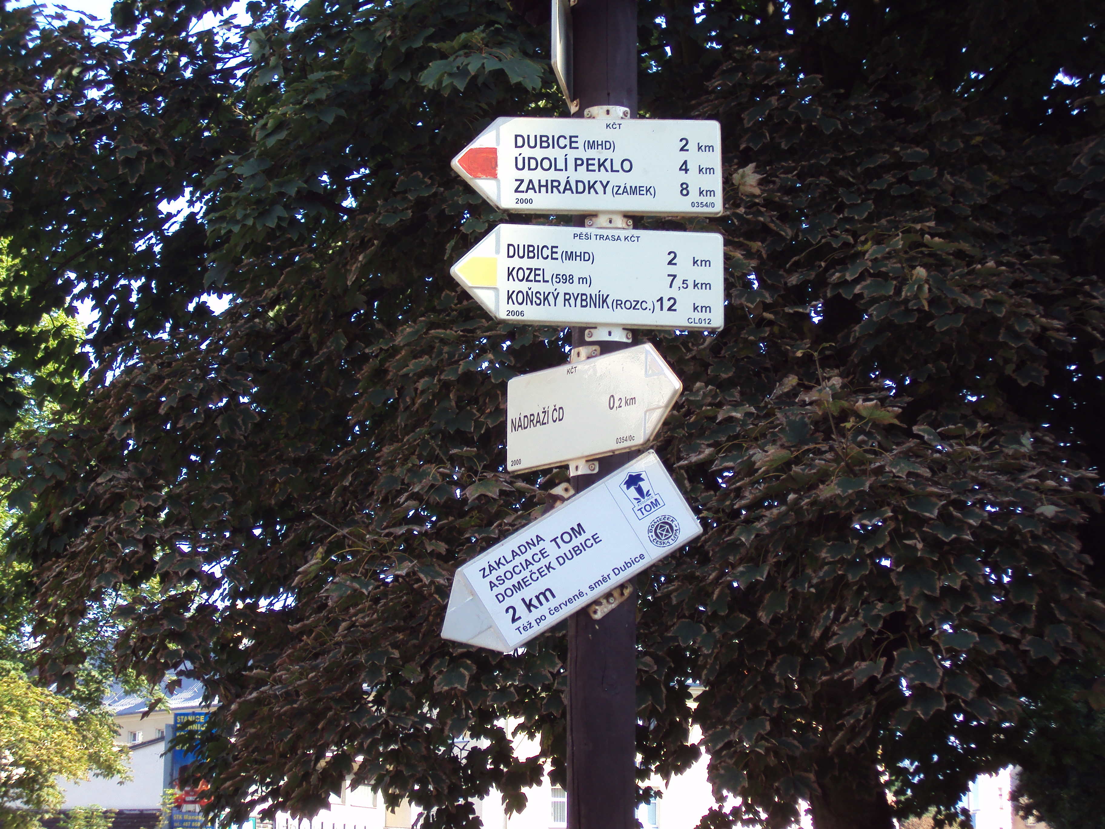 Rozcestník KČT CL012 červené trasy 0354 a žluté trasy, stojí 300 metrů od hlavního vlakového nádraží směrem ke středu města Česká Lípa